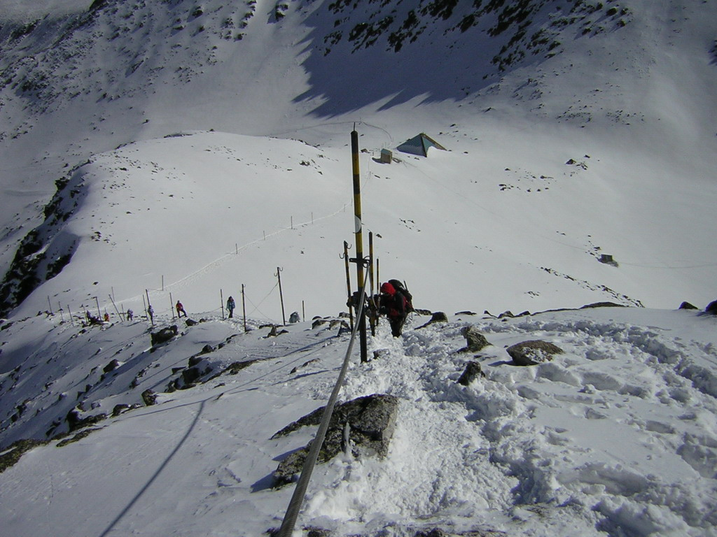 Rila Mountain in Bulgaria, near Musala peak